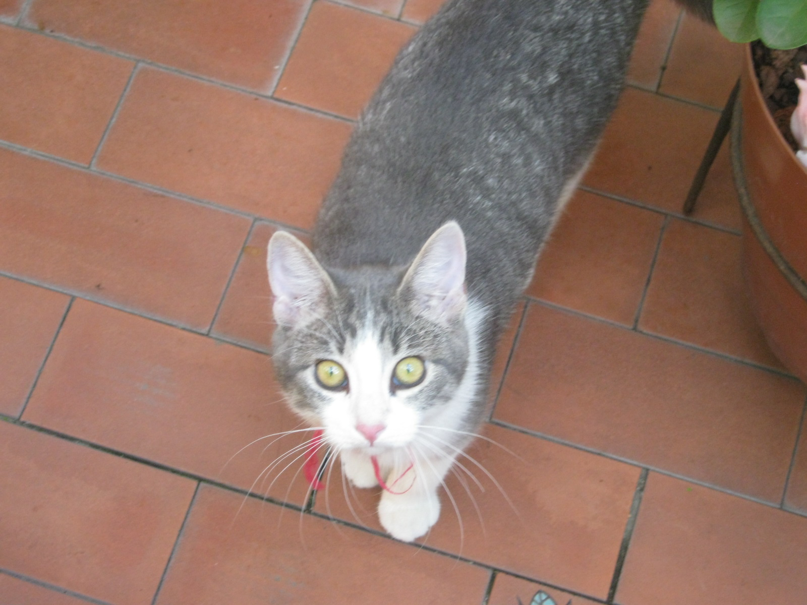 Marrí